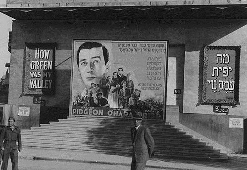 הסרט מה יפית עמק נוי בקולנוע מוגרבי